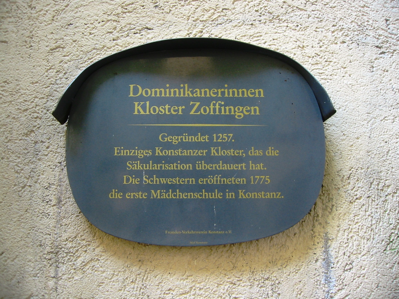 Hinweisschild des Fremdenverkehrsamtes am Kloster Zoffingen, ein Dominikanerinnenkloster aus dem 13. Jahrhundert in Konstanz am Bodensee.